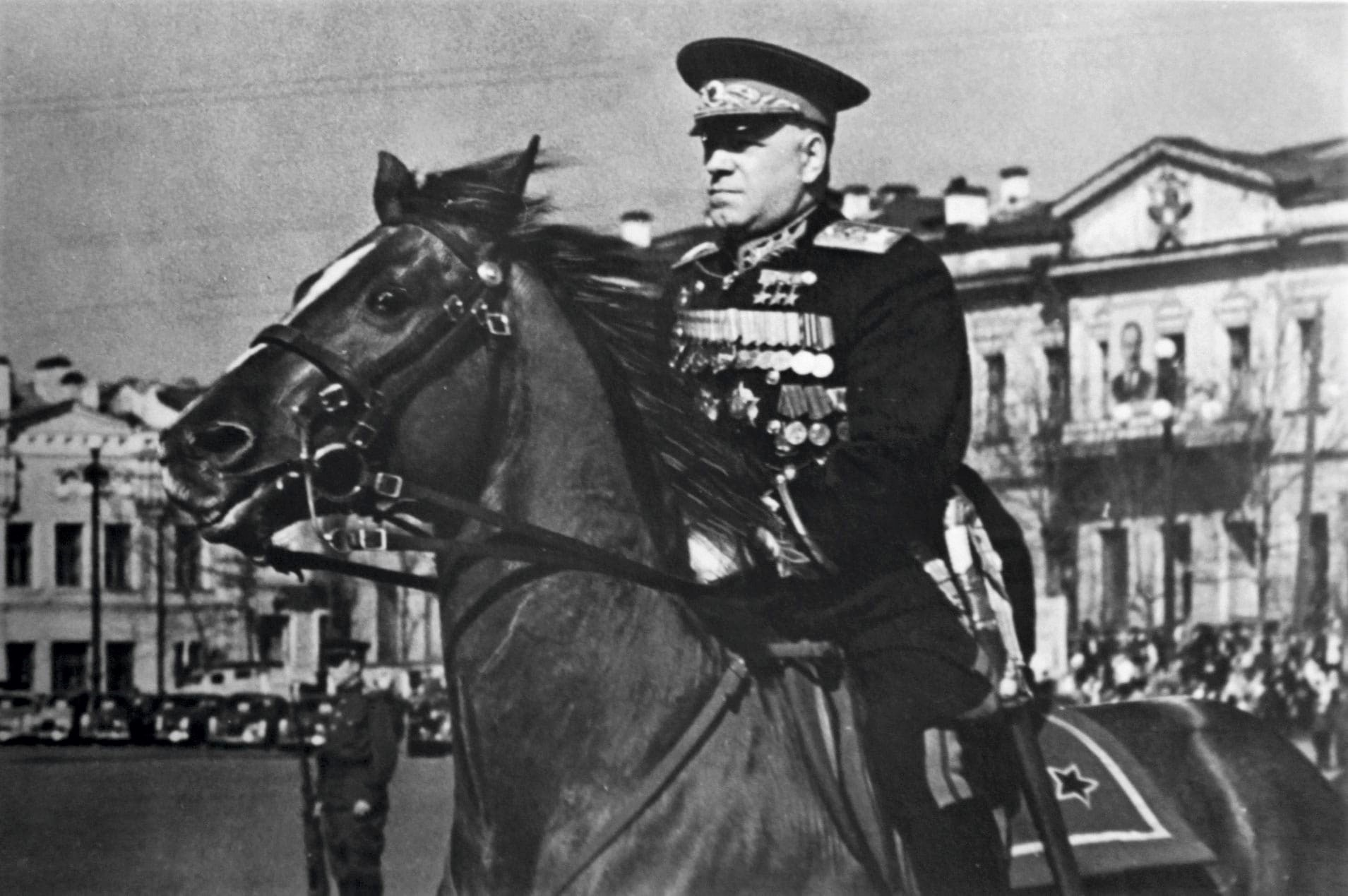 Командующий войсками Уральского военного округа трижды Герой Советского Союза Маршал Советского Союза Г. К. Жуков на принимает первомайский парад на площади 1905 года в Свердловске